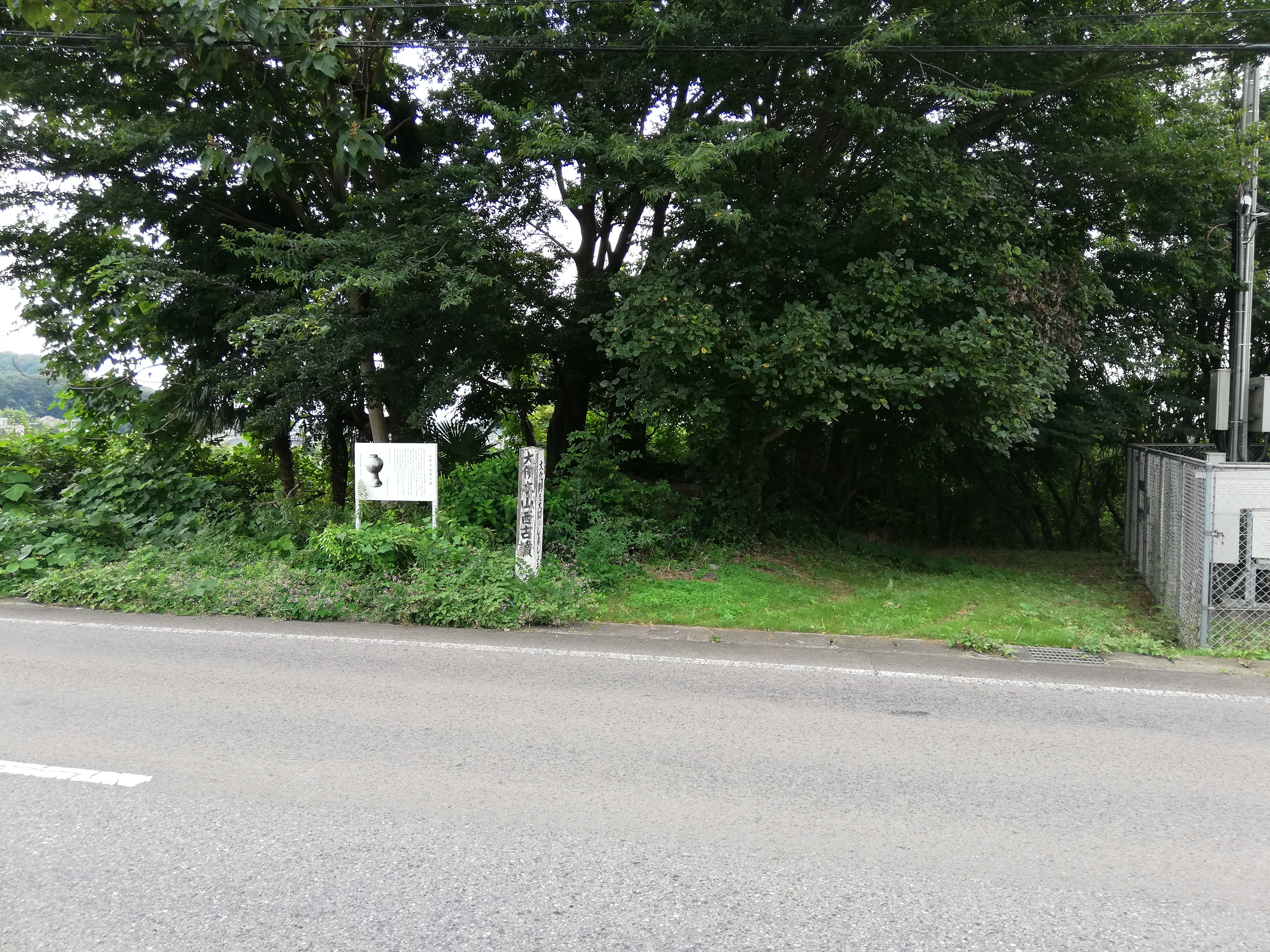 大伊木山西古墳を北より見た様子。